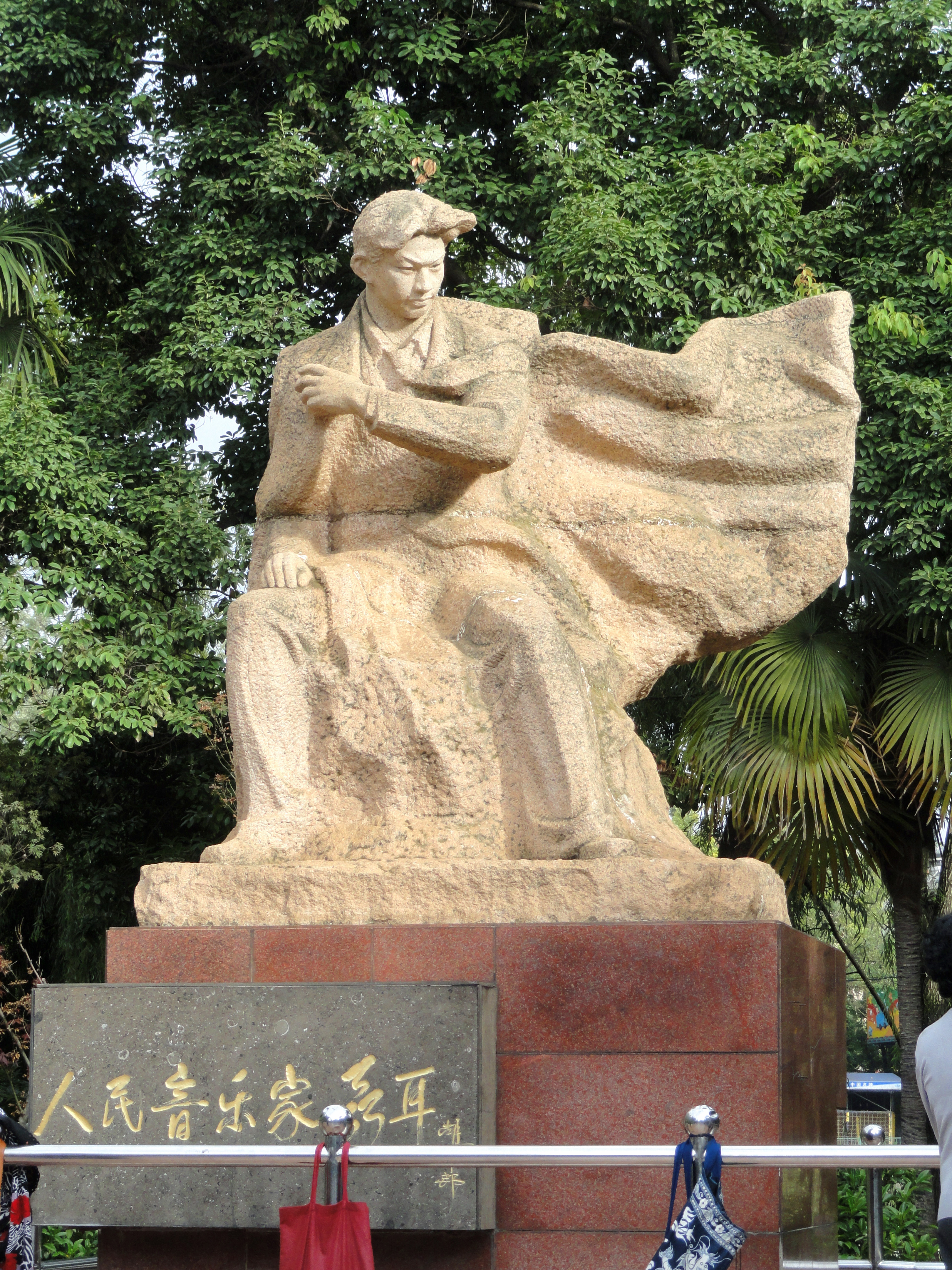 Nie Er monument, Green Lake Park, Kunming, Yunnan, China.